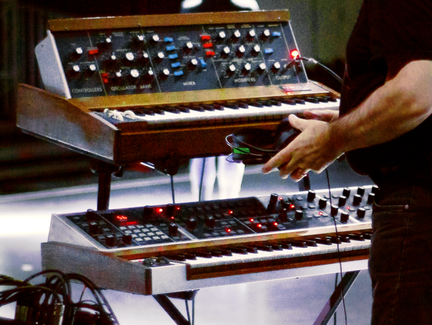 Memorymoog, Minimoog, Esa Kotilainen, Energo 2011 making of